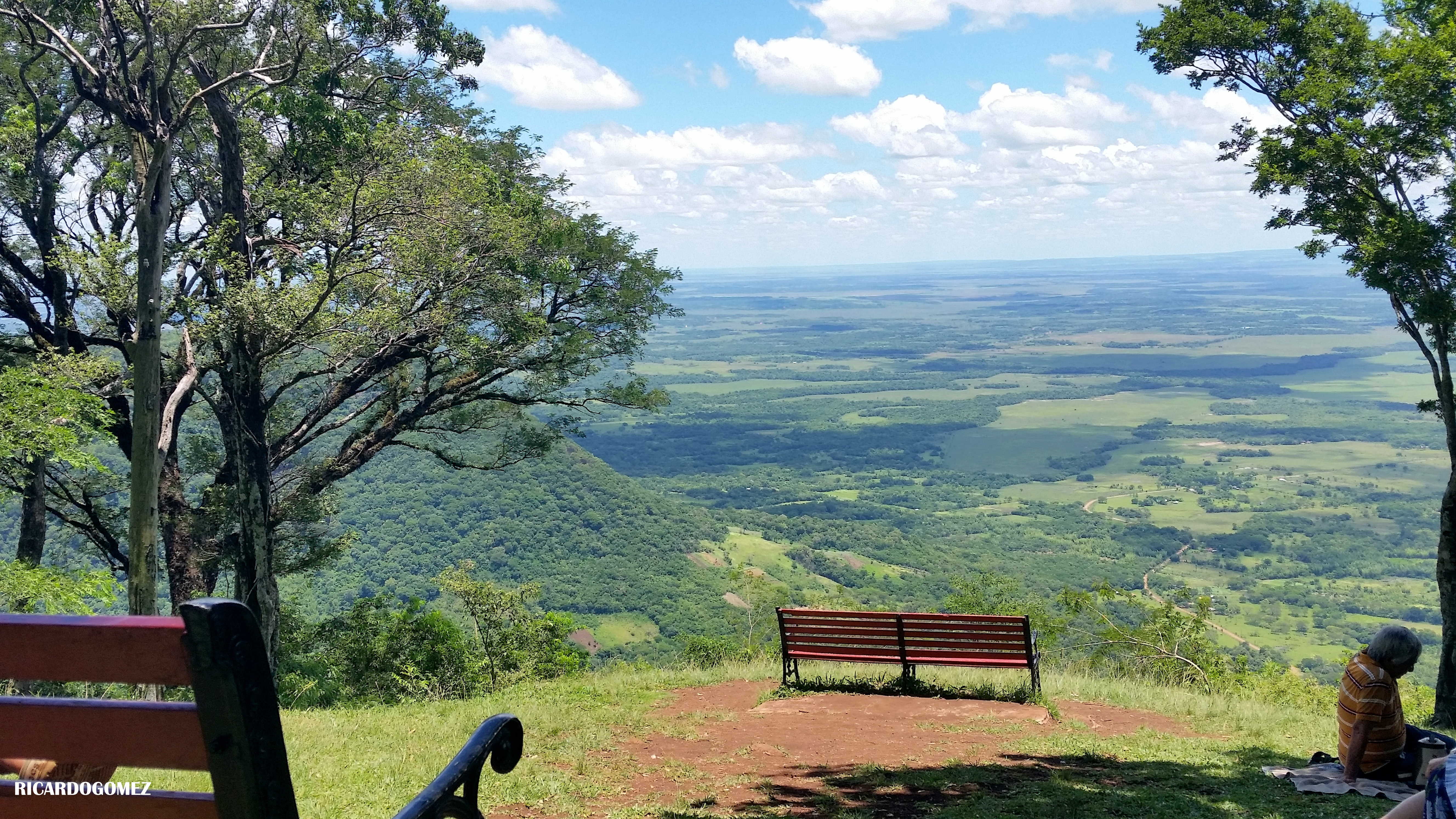 Forma parte de la Cordillera de yvytyrusu Paraguay